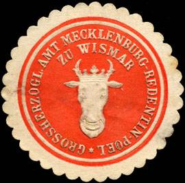 Sealing stamp Title: Grossherzogliches Amt Mecklenburg - Redentin - Poel zu Wismar Description: rot, weiß, geprägt Place: Wismar size: 4 cm